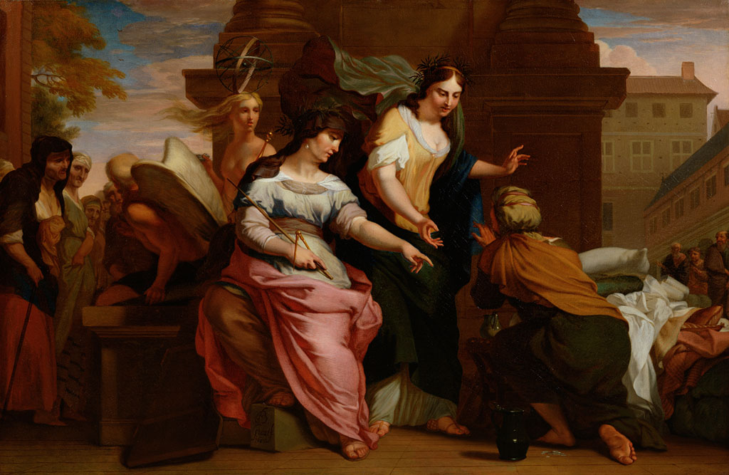 schilderij; ouderenzorg; Oude Mannen- en Vrouwengasthuis; allegorie; ouderen; Economia; Saturnus